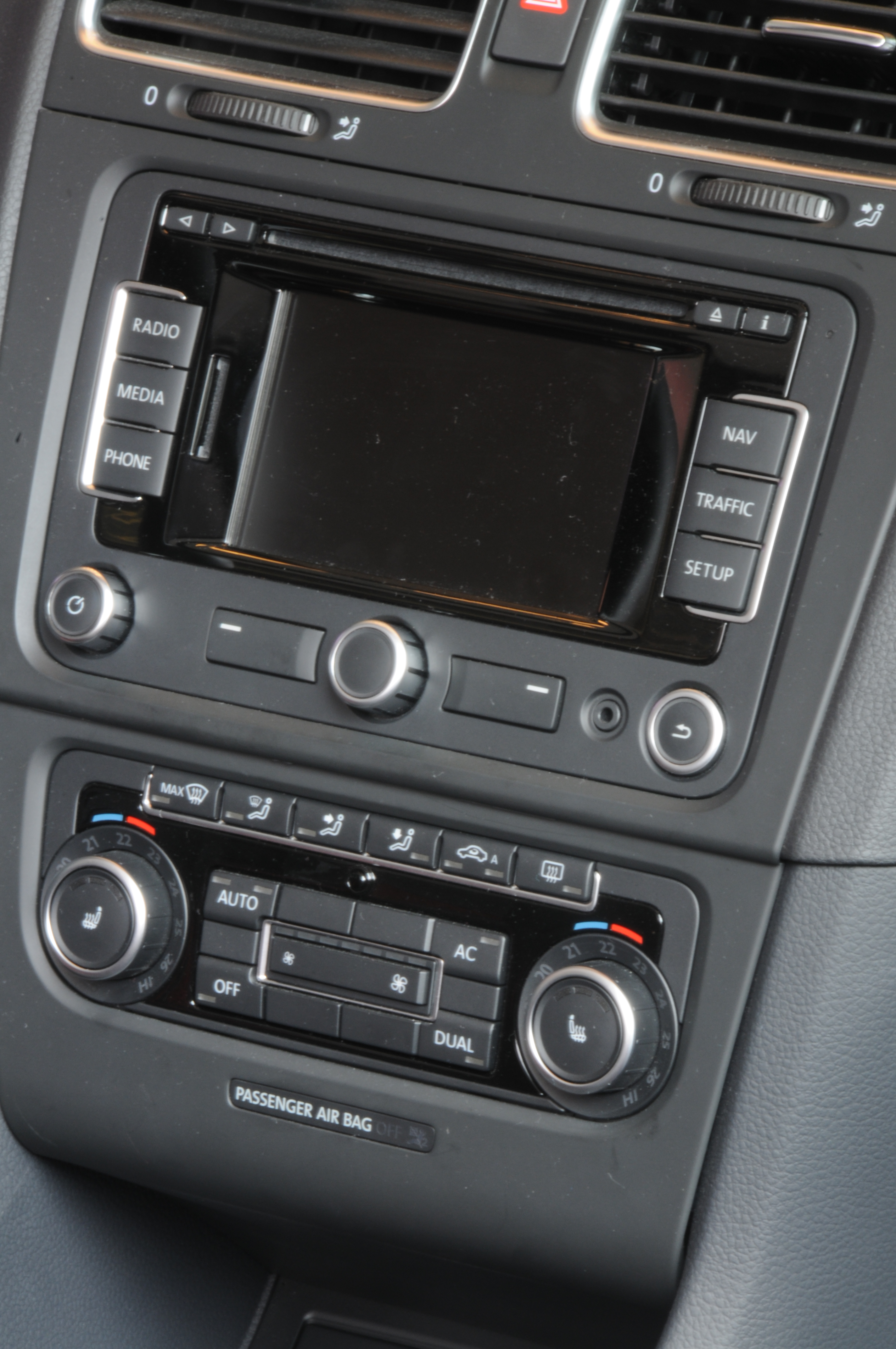 Detail Volkswagen